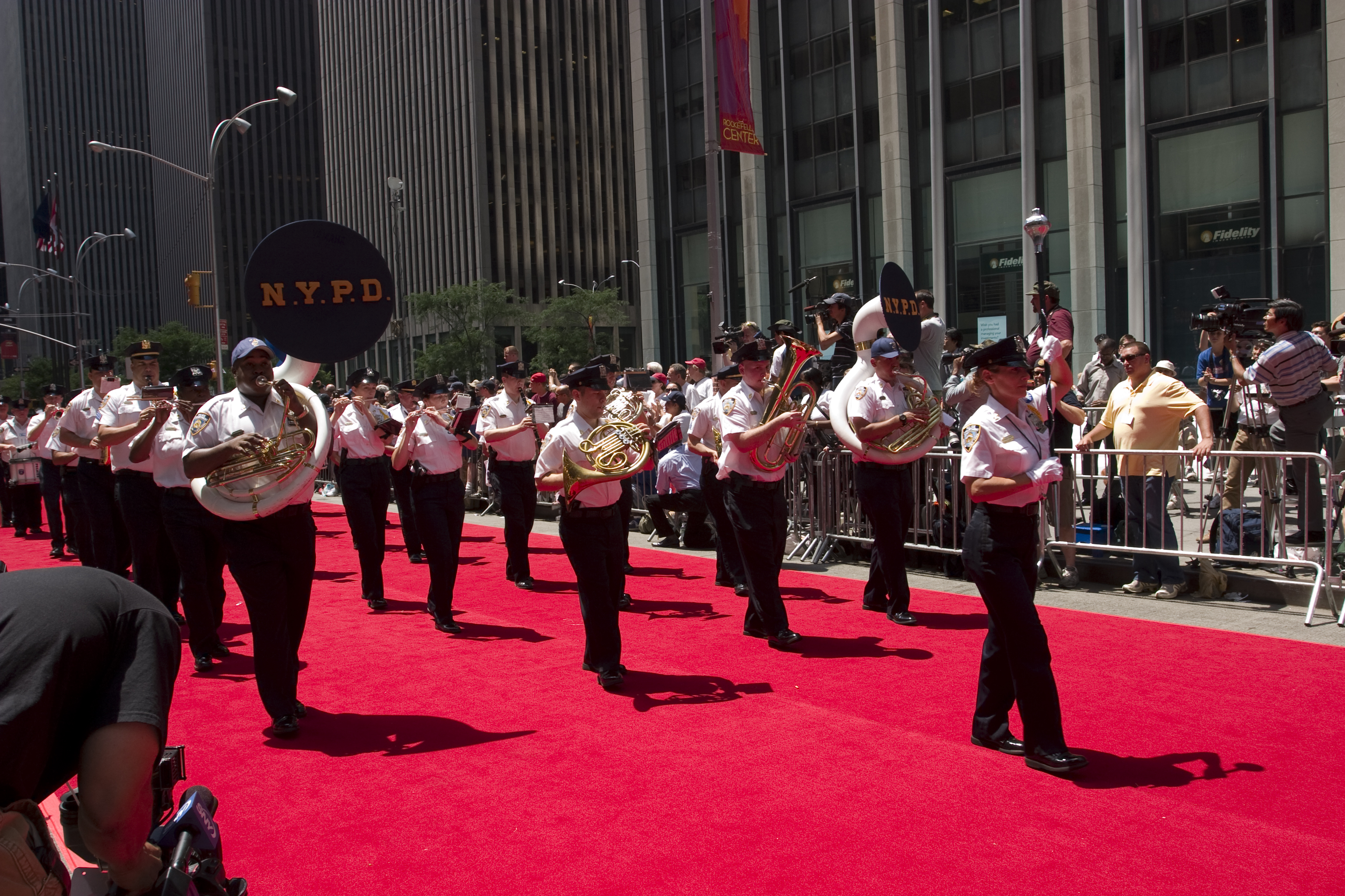 © Rubenstein, photographer Martyna Borkowski